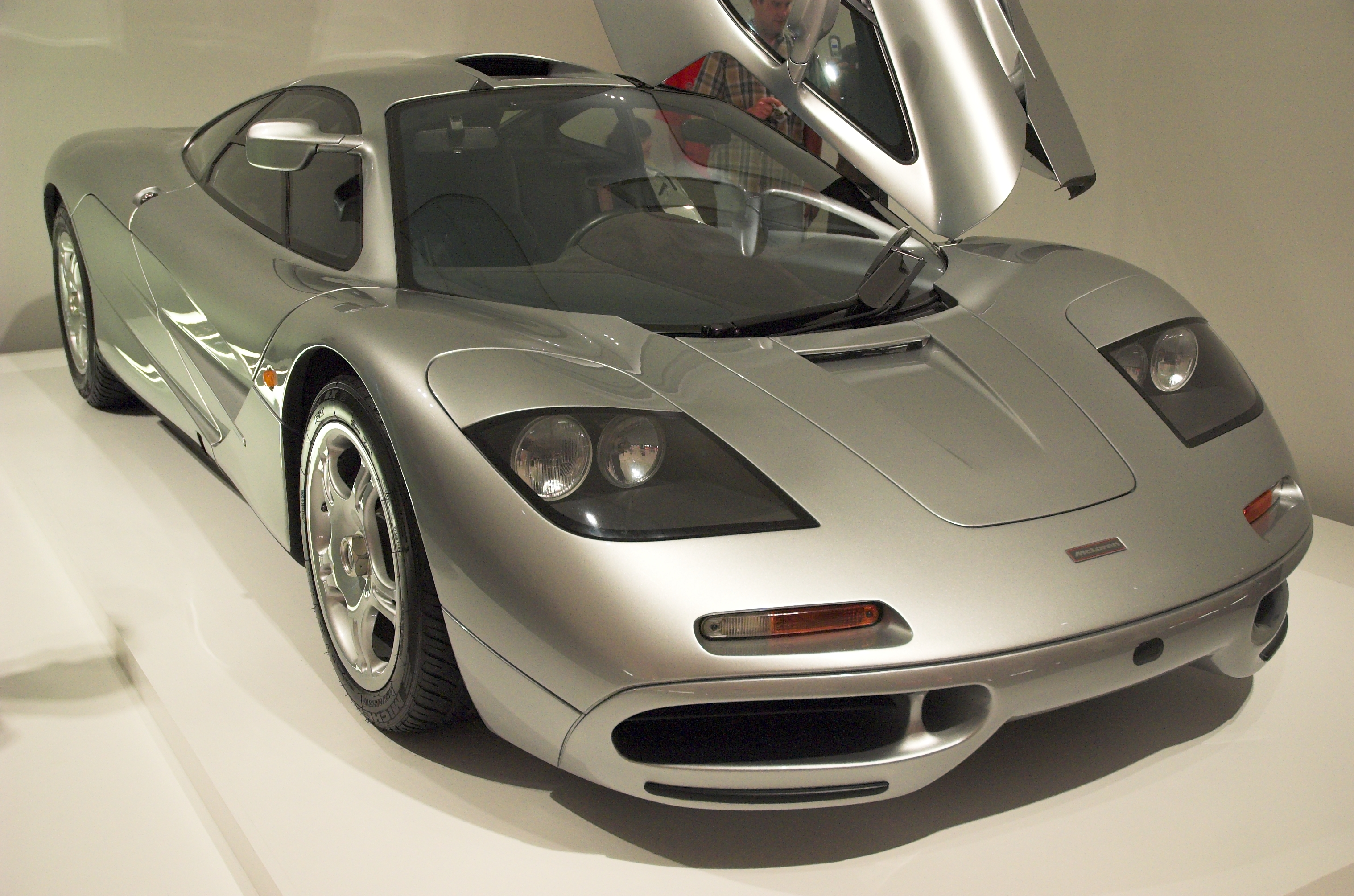 1996 McLaren F1